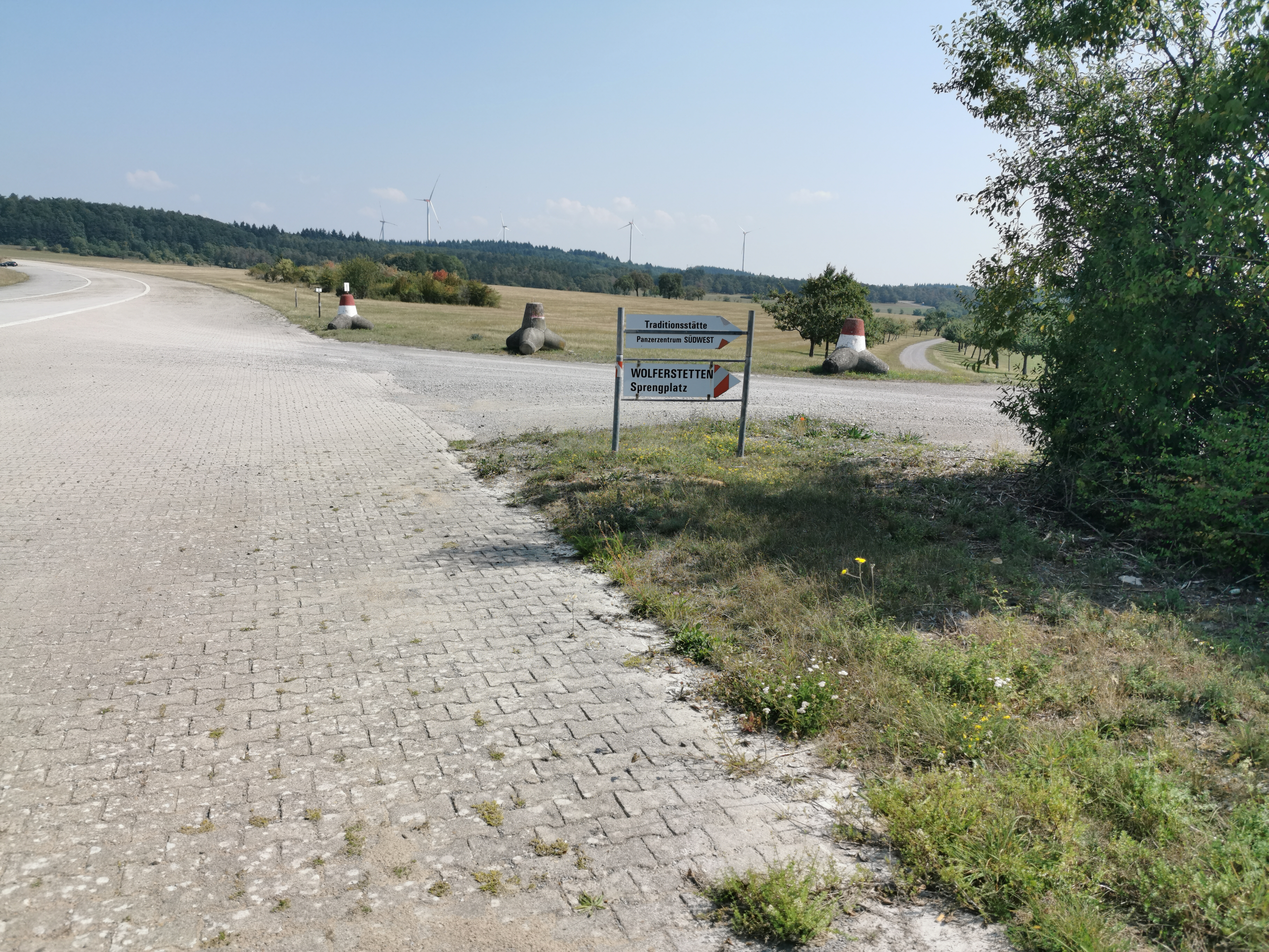 Radtour bei Külsheim